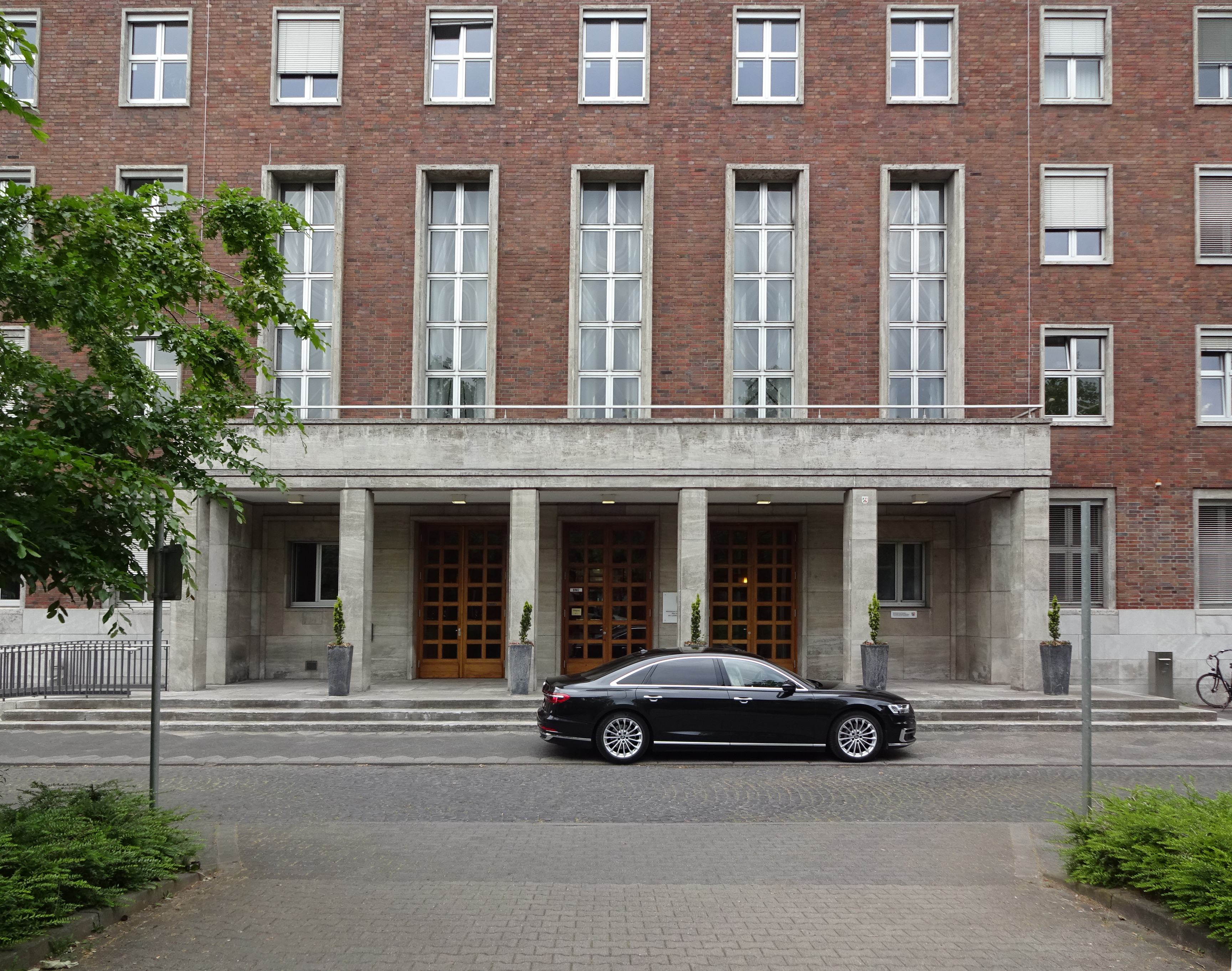 Dienstwagen vor dem Portal des Ministeriums für Heimat, Kommunales, Bau und Gleichstellung des Landes Nordrhein-Westfalen, Jürgensplatz 1, Düsseldorf-Unterbilk